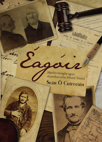 Cois Life ISBN: 978-1-907494-61-1 Foilsithe: 2016